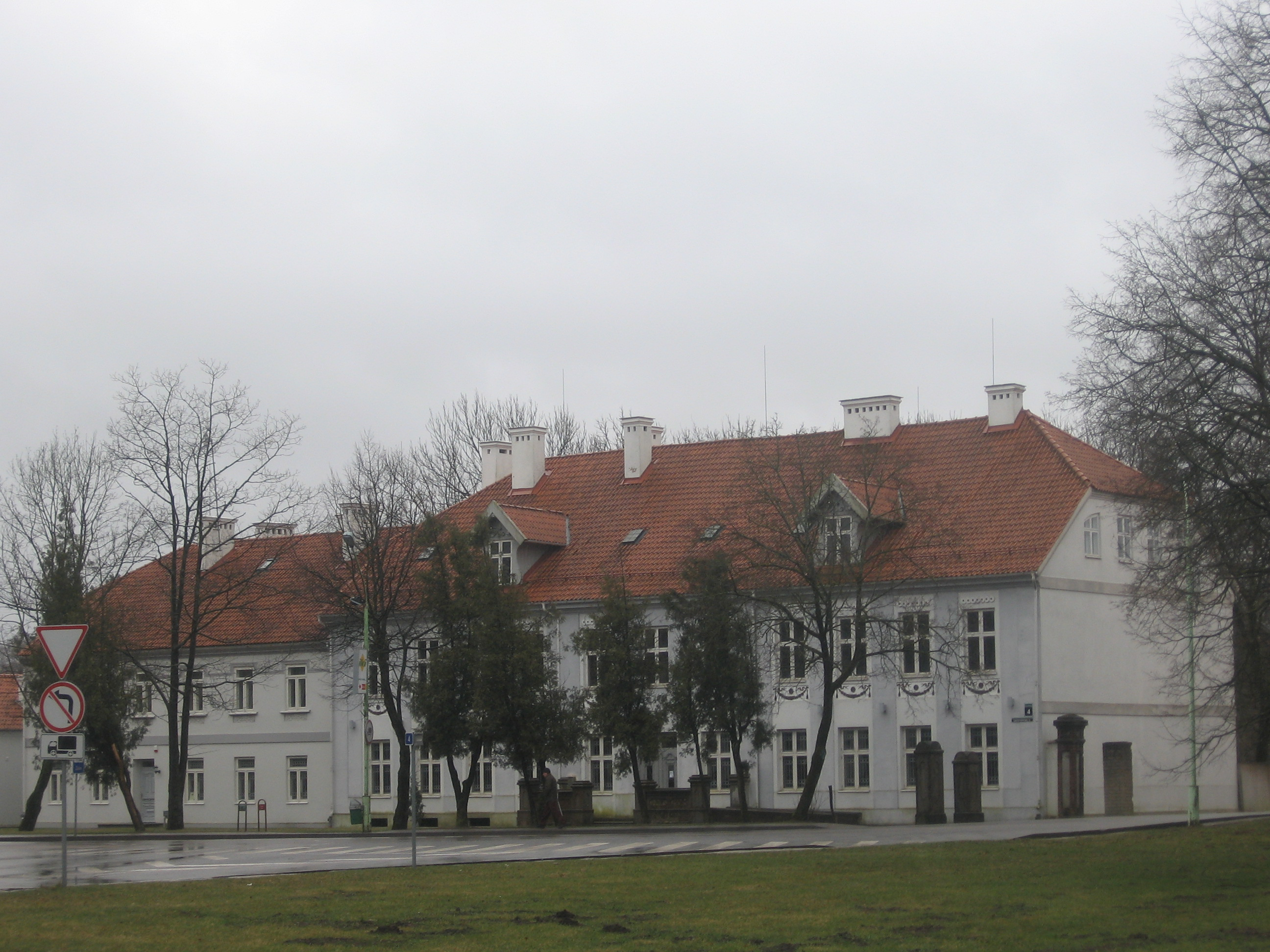 H. Šojaus dvaras